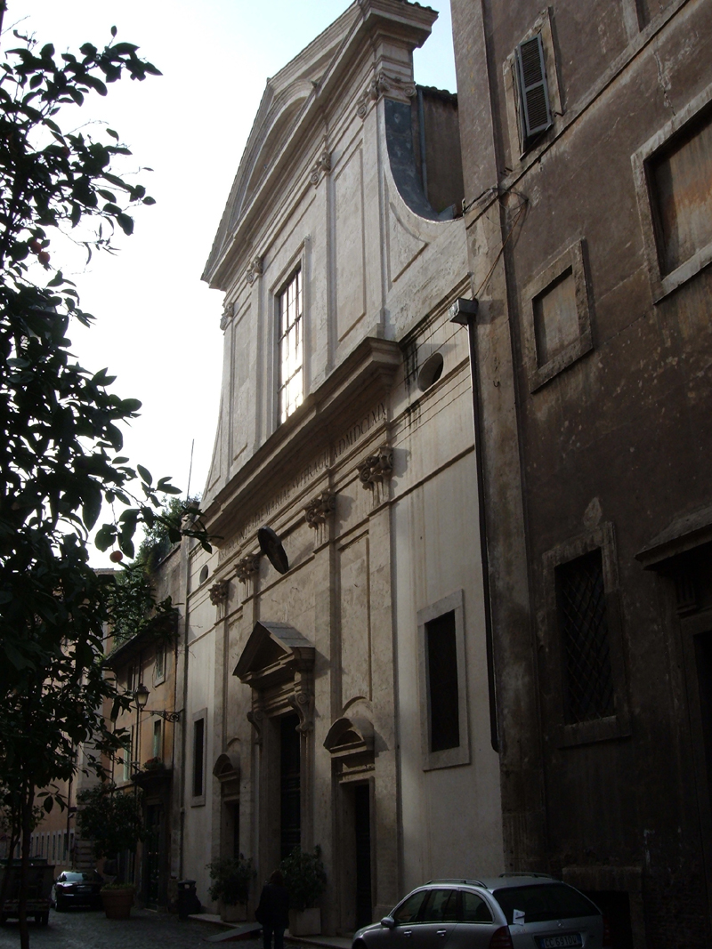 Chiesa di S. Maria del Suffragio a Roma, nel rione Ponte